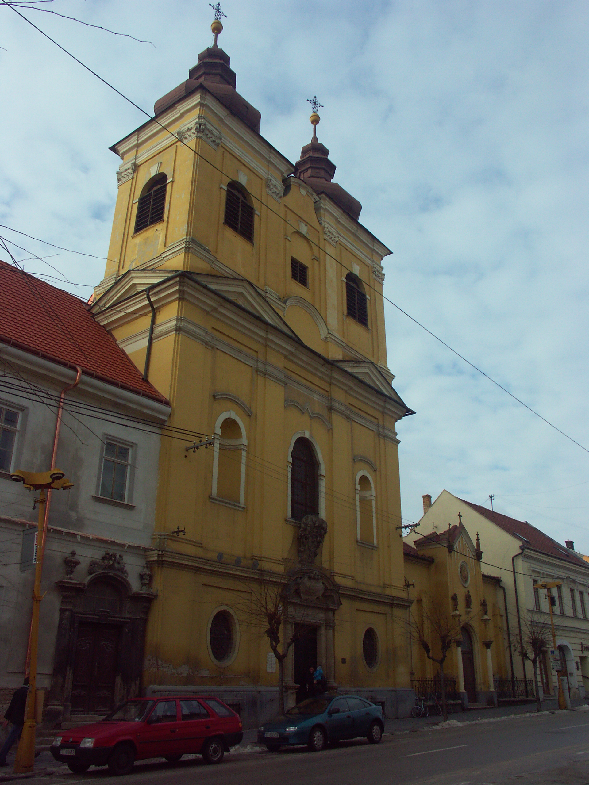 Trnava - Kostol Nasvätejšej Trojice, pôvodne trinitársky, v súčasnosti jezuitsky This medium shows the protected monument with the number 207-1126/2 (other) in the Slovak Republic.